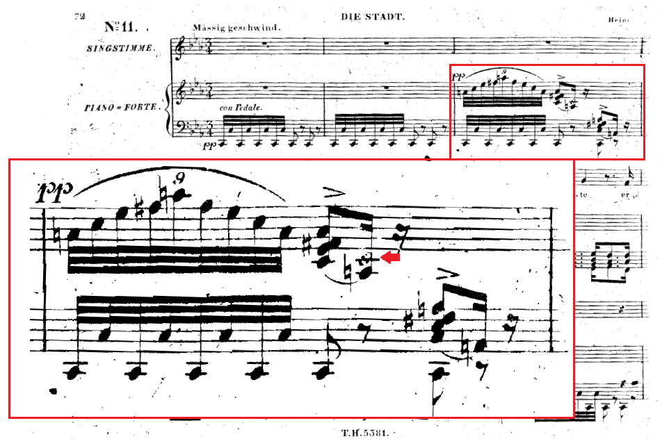 Modification de l'image "Die Stadt tirage avec coquille.png"